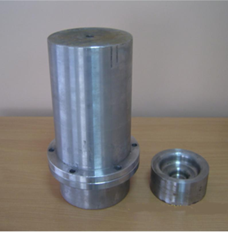 Технологическая оснастка для деформирования листовых заготовок льдом.